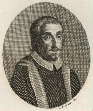 Giuseppe Battista (Grottaglie, 11 febbraio 1610 – Napoli, 6 marzo 1675), poeta italiano.